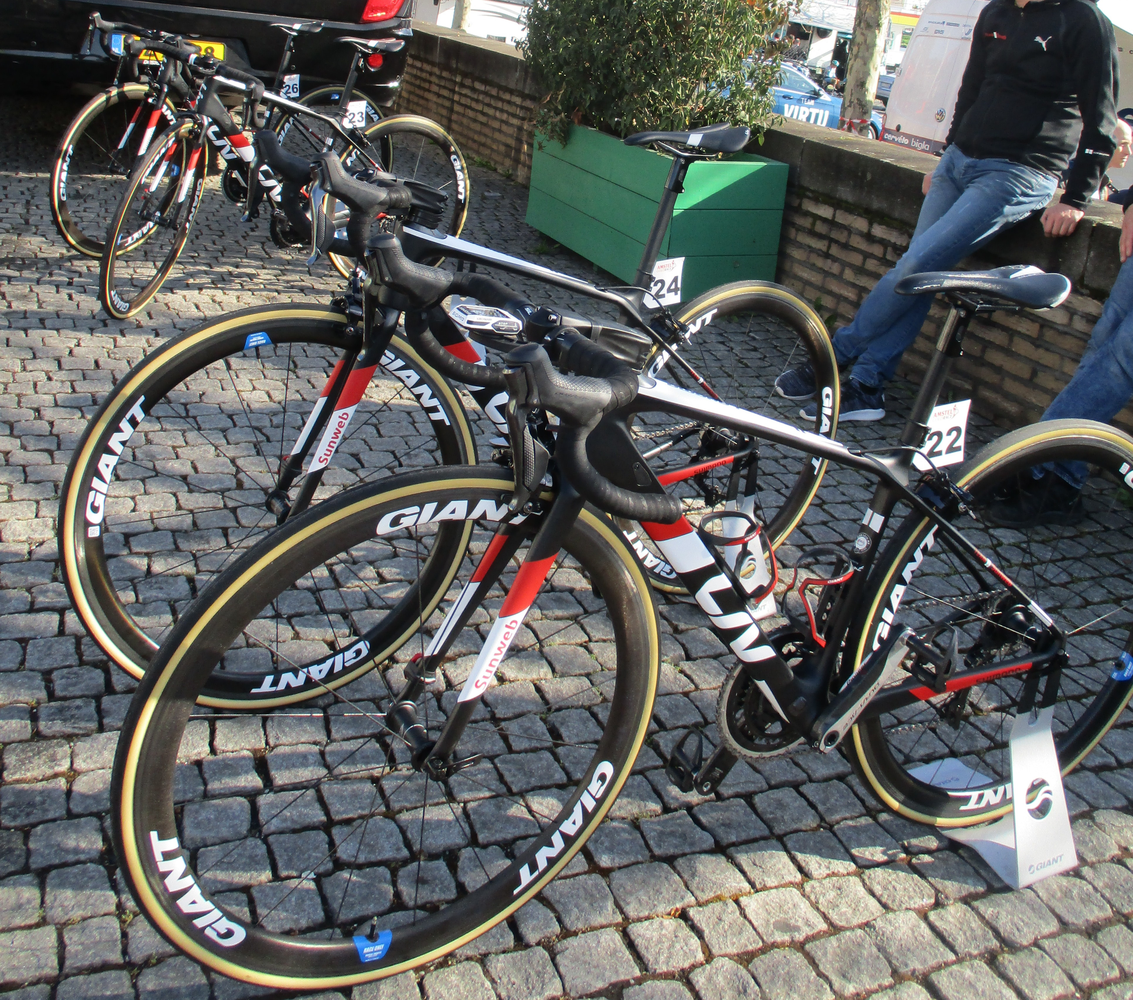 Start van de Amstel Gold Race Ladies Edition 2018 in Maastricht.